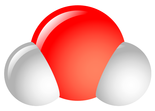 molecule model